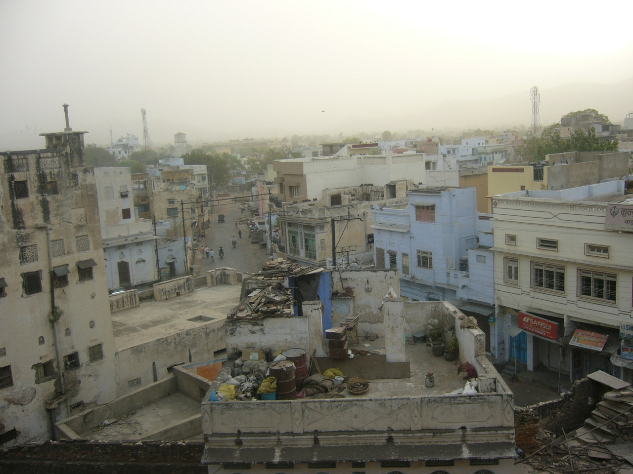 Ajmer India